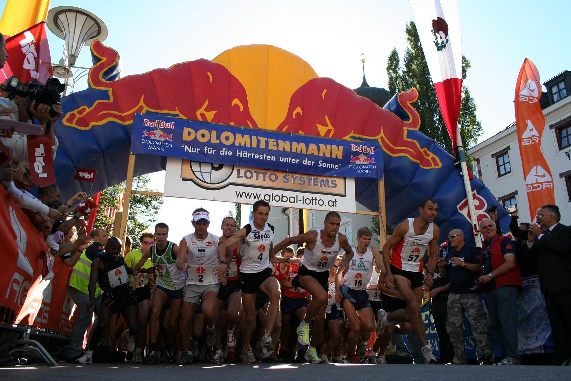 Start zum Red Bull Dolomitenmann